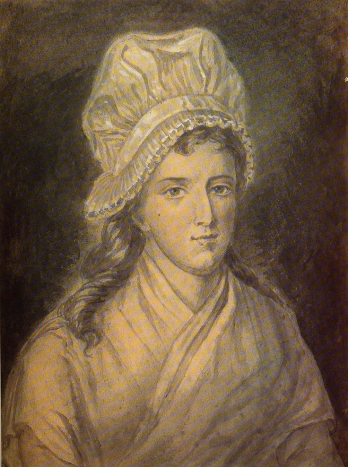 Portrait de Charlotte Corday, la veille de son exécution, peinture de Hauer d'après un premier croquis.